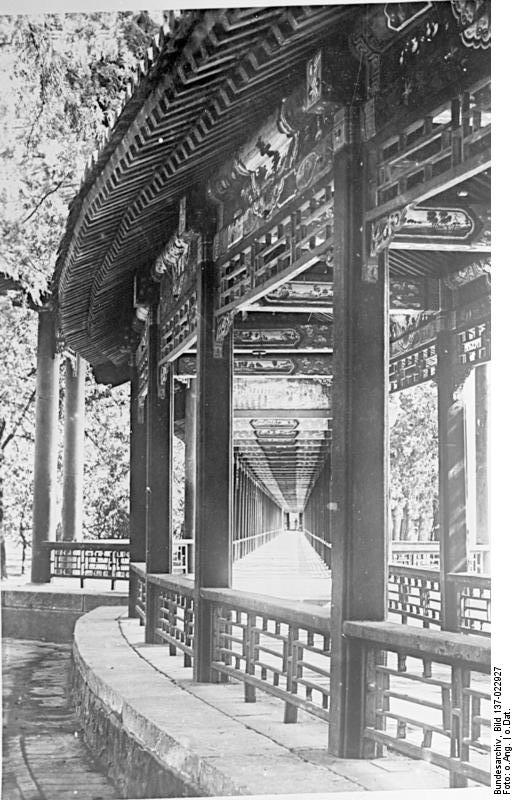 Nordchina, Prov. Chihli, Peking, aus dem Sommerpalast